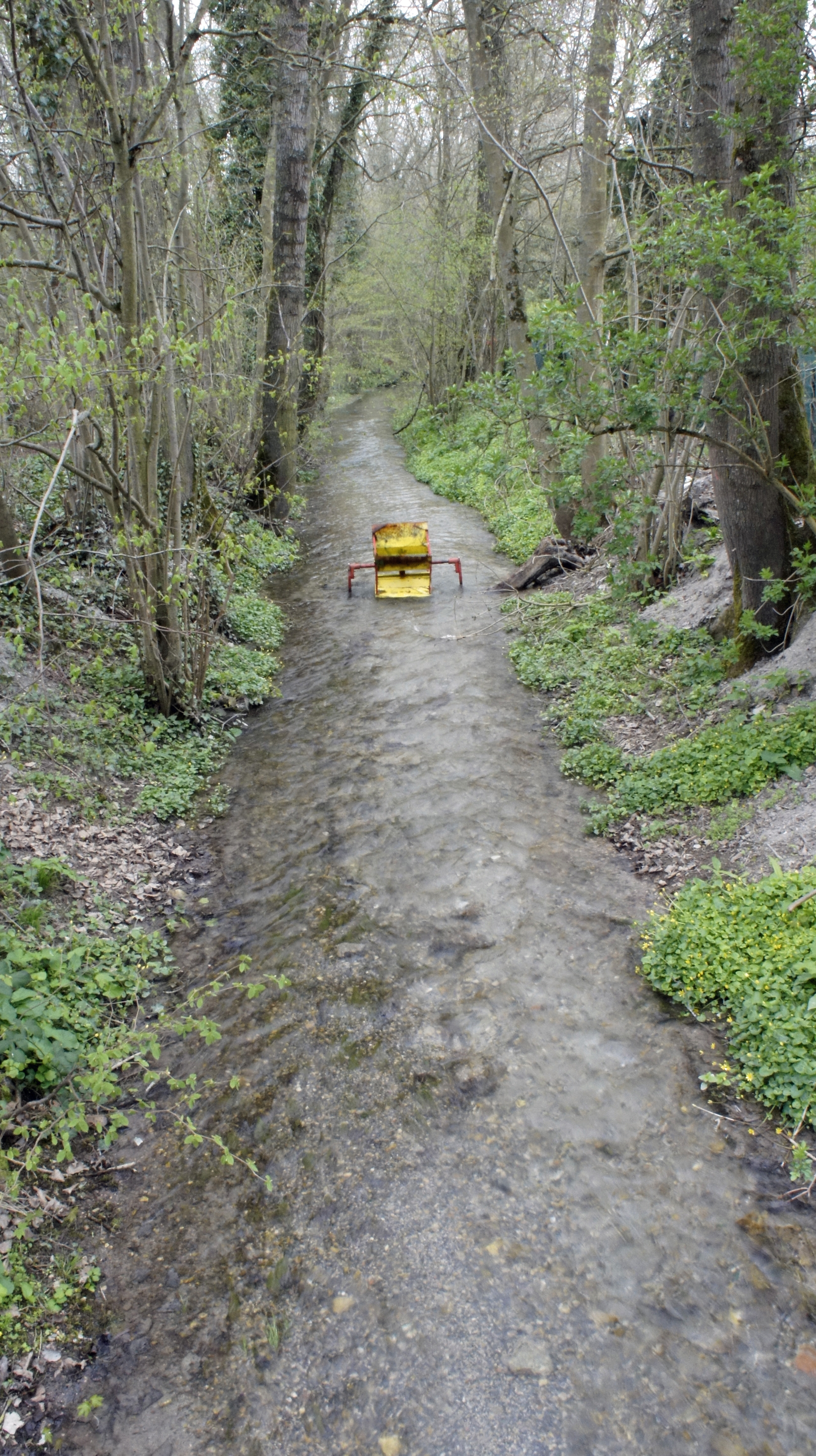 Le_Prosnes_au lieu dit Le_moulin .